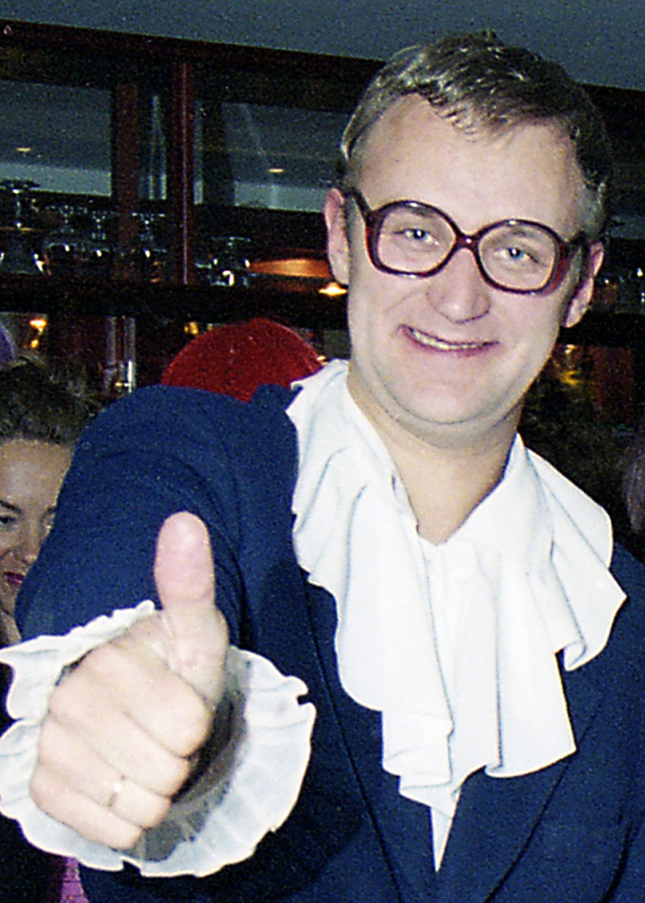 Henrik Normann, meelelahutustegelane ja näitleja 2000